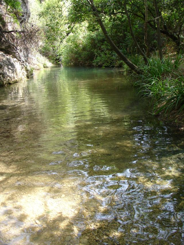 Río Cañamares (provincia de Jaén).